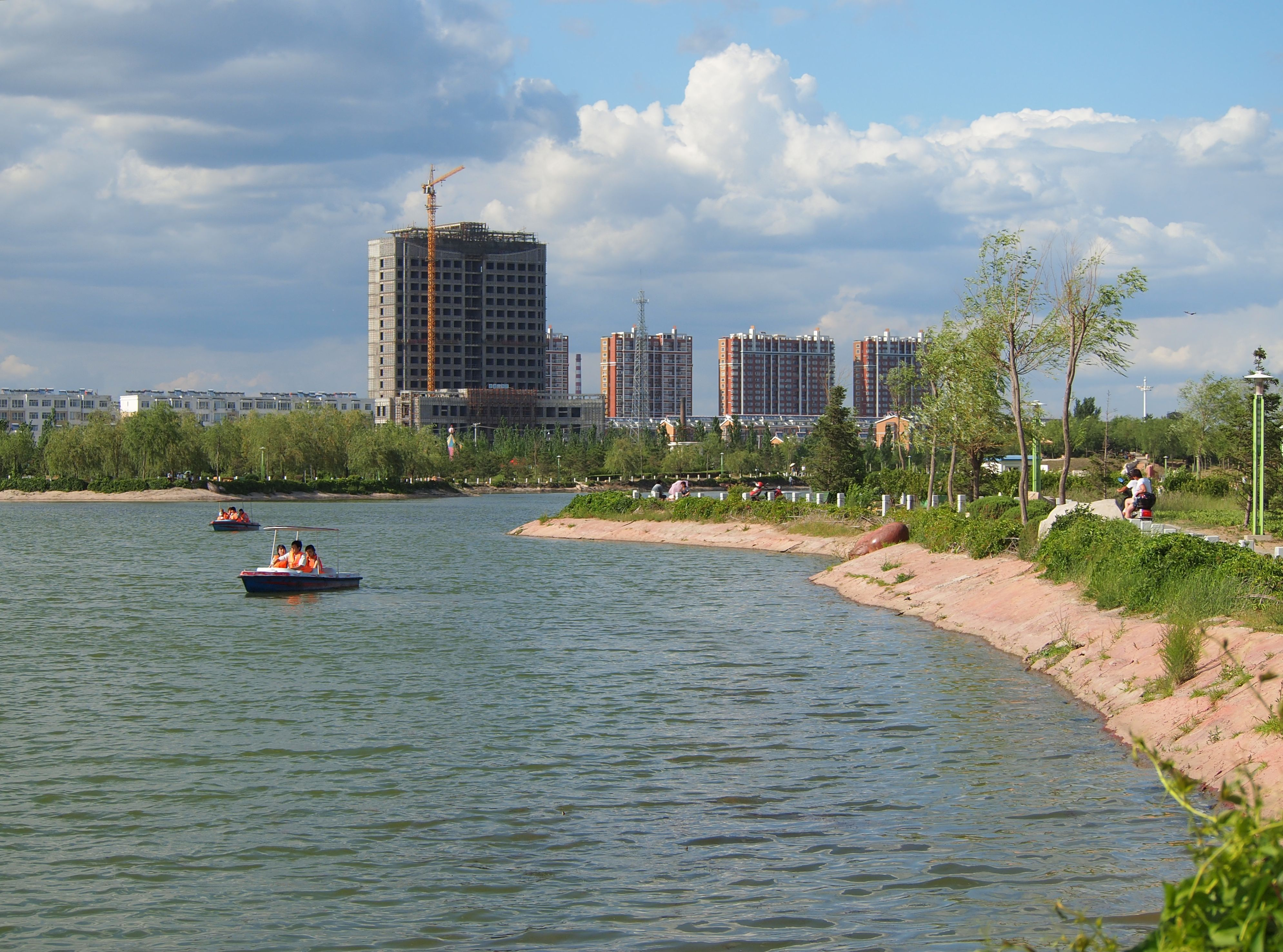 湖区 - Lake District - 2011.07